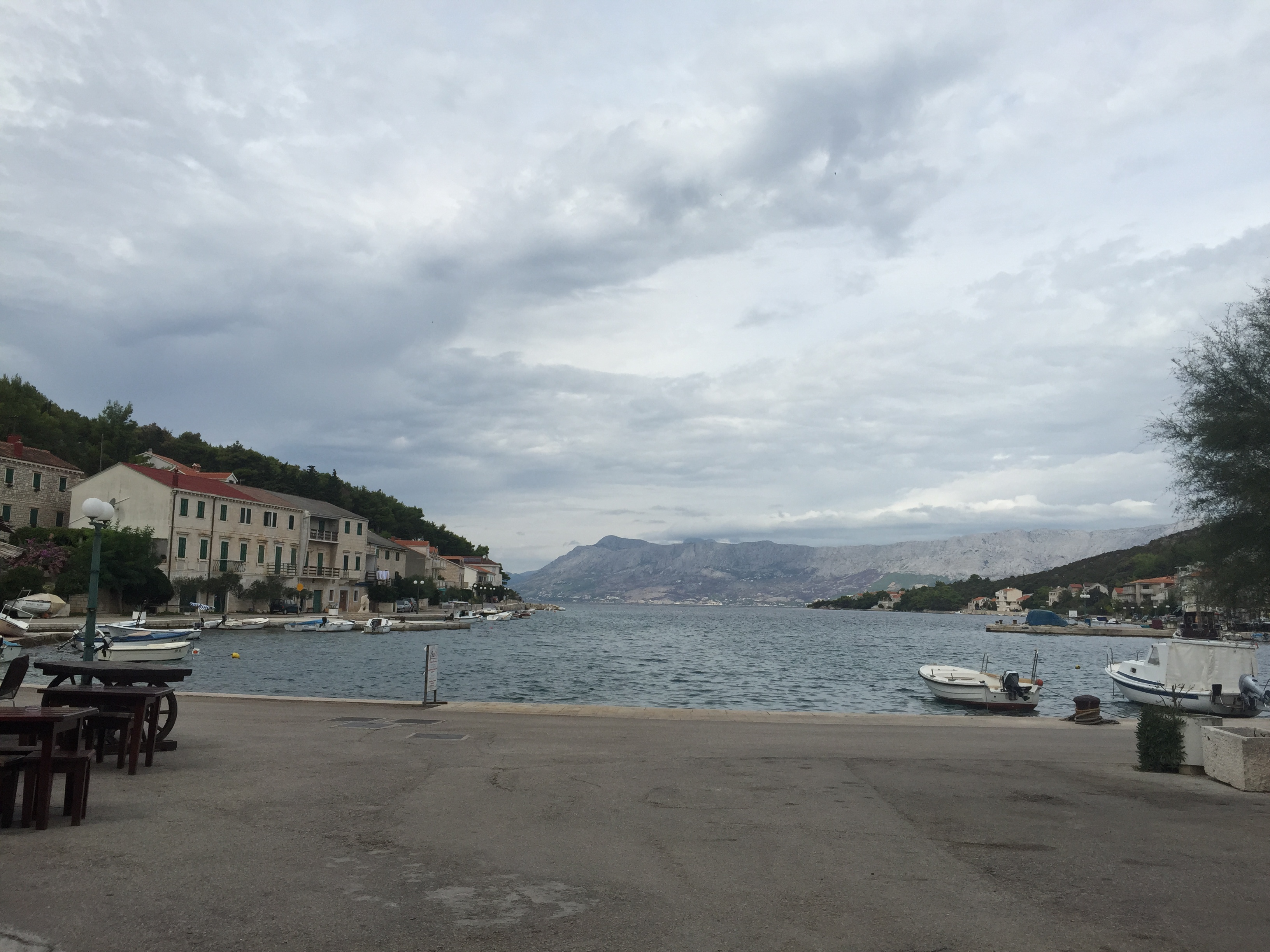 Povlja, Croatia